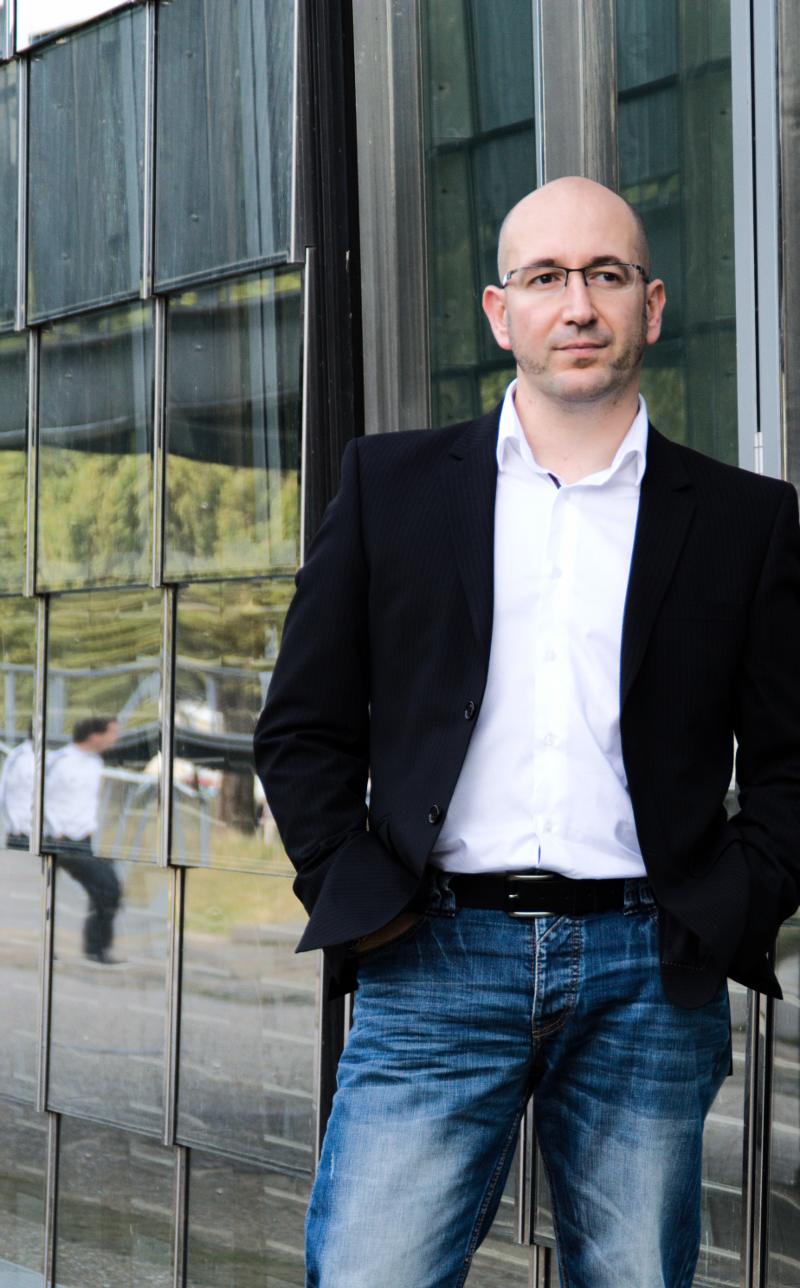 Christophe Masutti en 2012 à Strasbourg